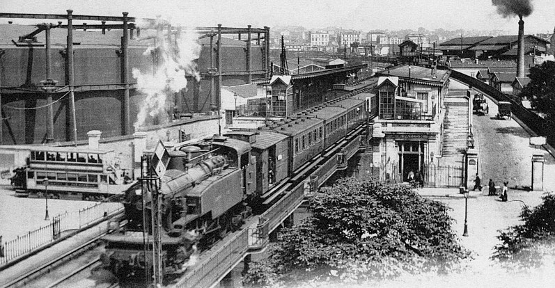 Gare Cours de Vincennes (Paris 20e) - Petite Ceinture